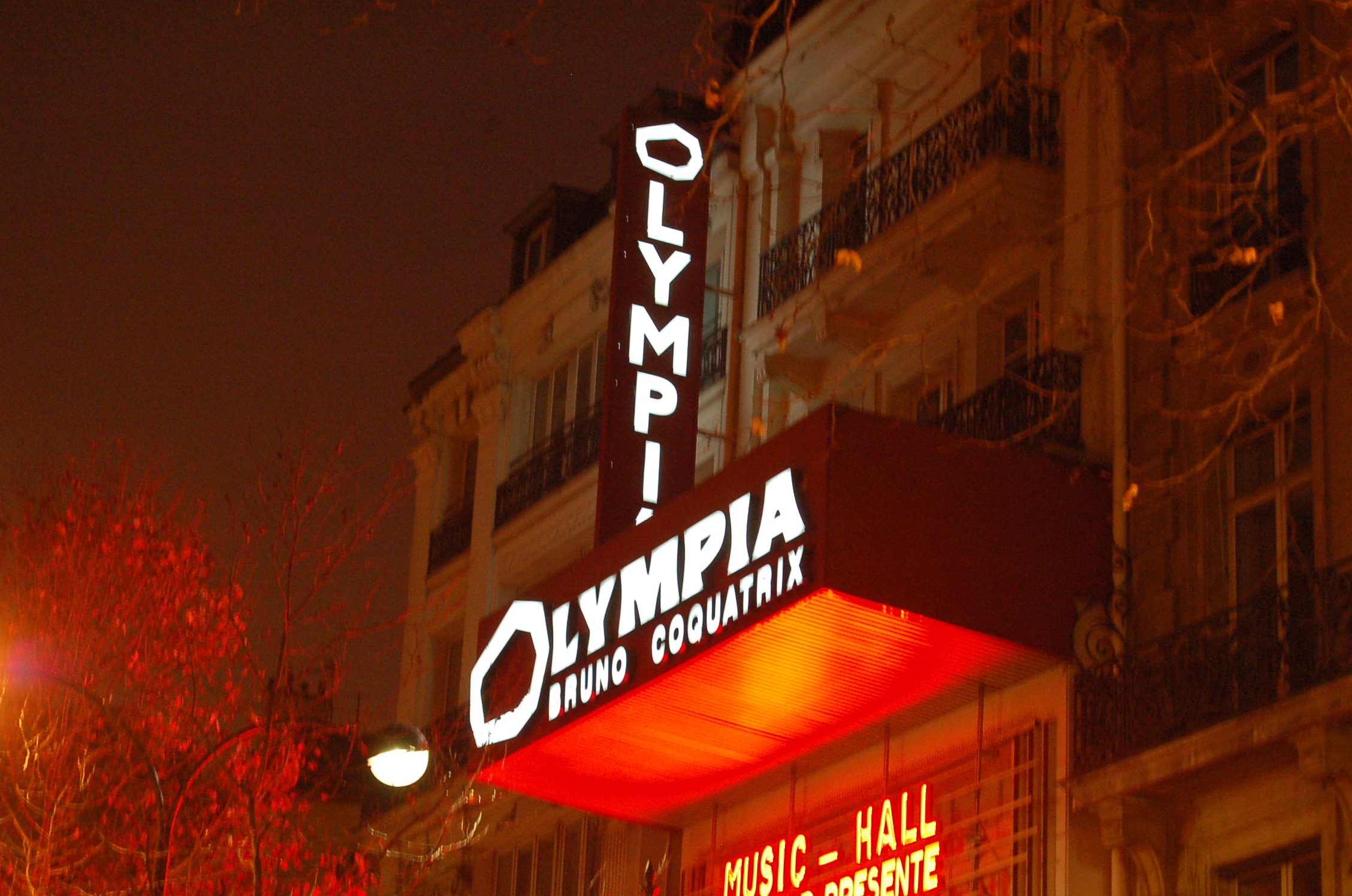 L'Olympia, Paris 9em, France